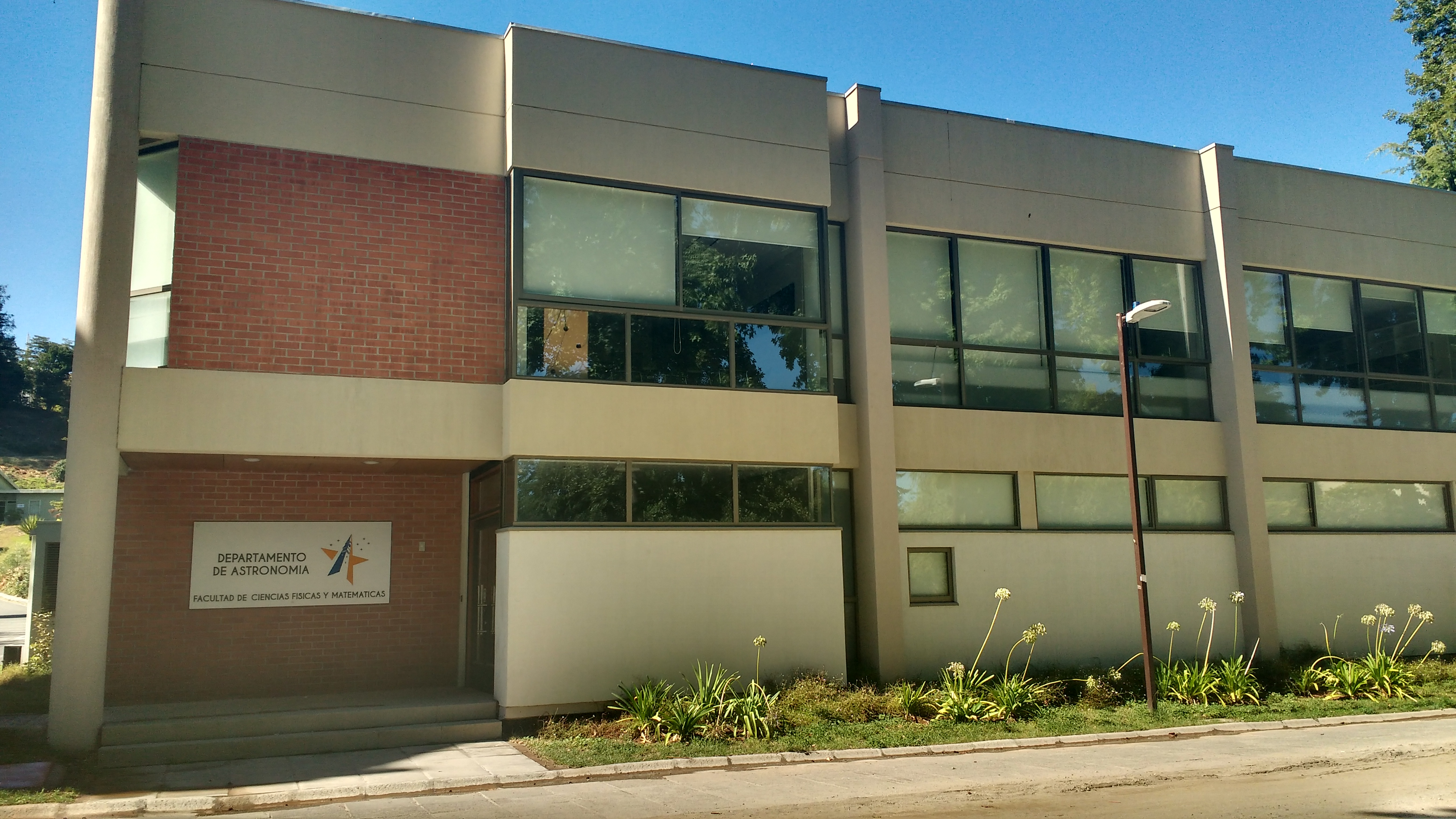 Departamento de Astronomía UdeC